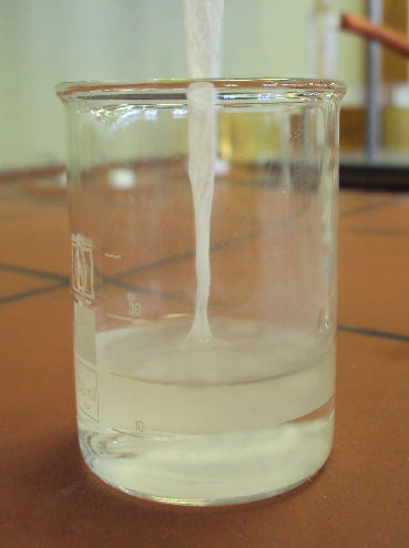 Nylon 6-6 wordt uit de grenslaag tussen 1,6-hexaandiamine (waterige fase) en adipoyldichloride (organische fase) getrokken